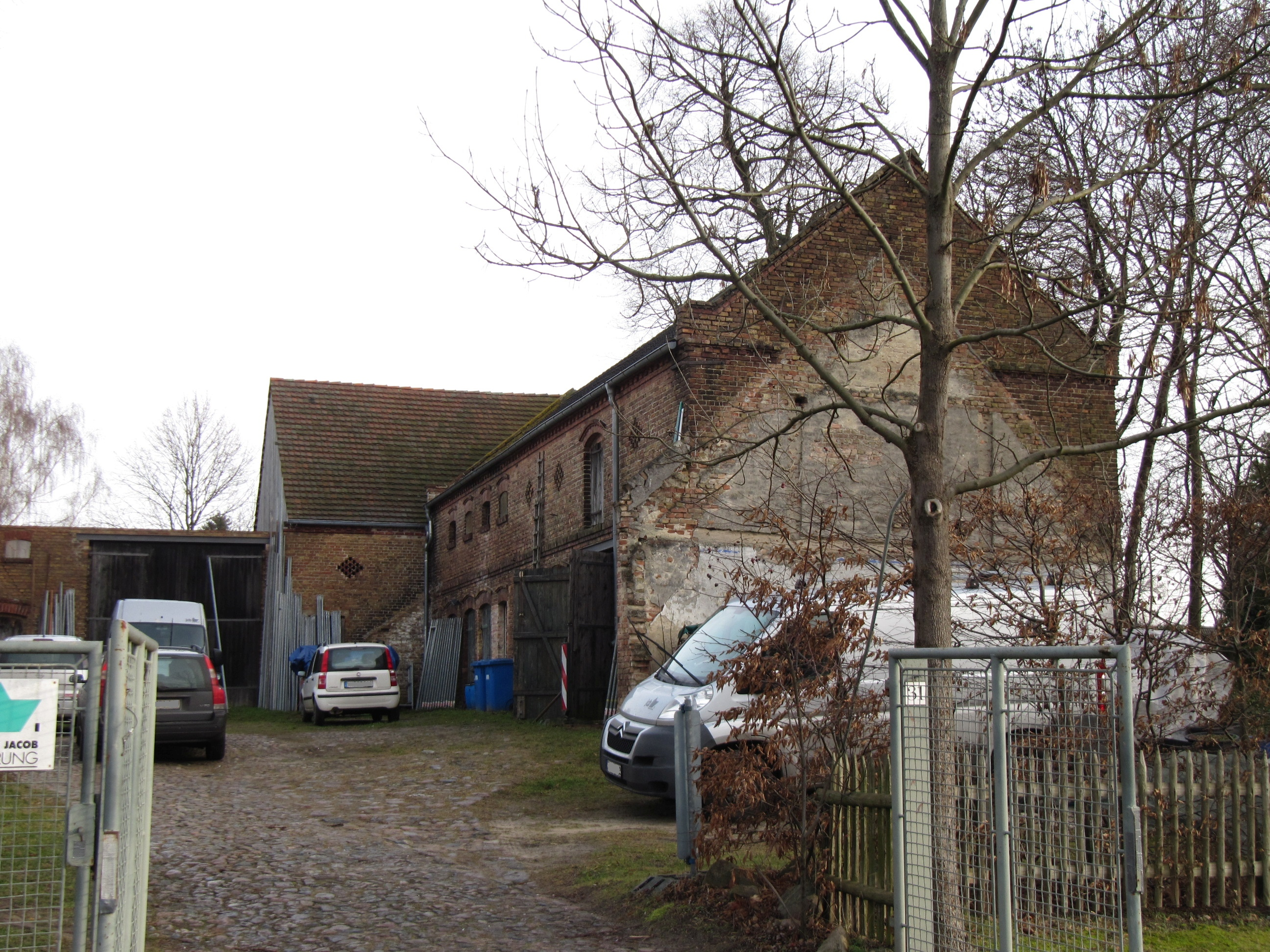 Hofgebäude des Pfarrgehöfts Dorfstraße 31 Ketzür